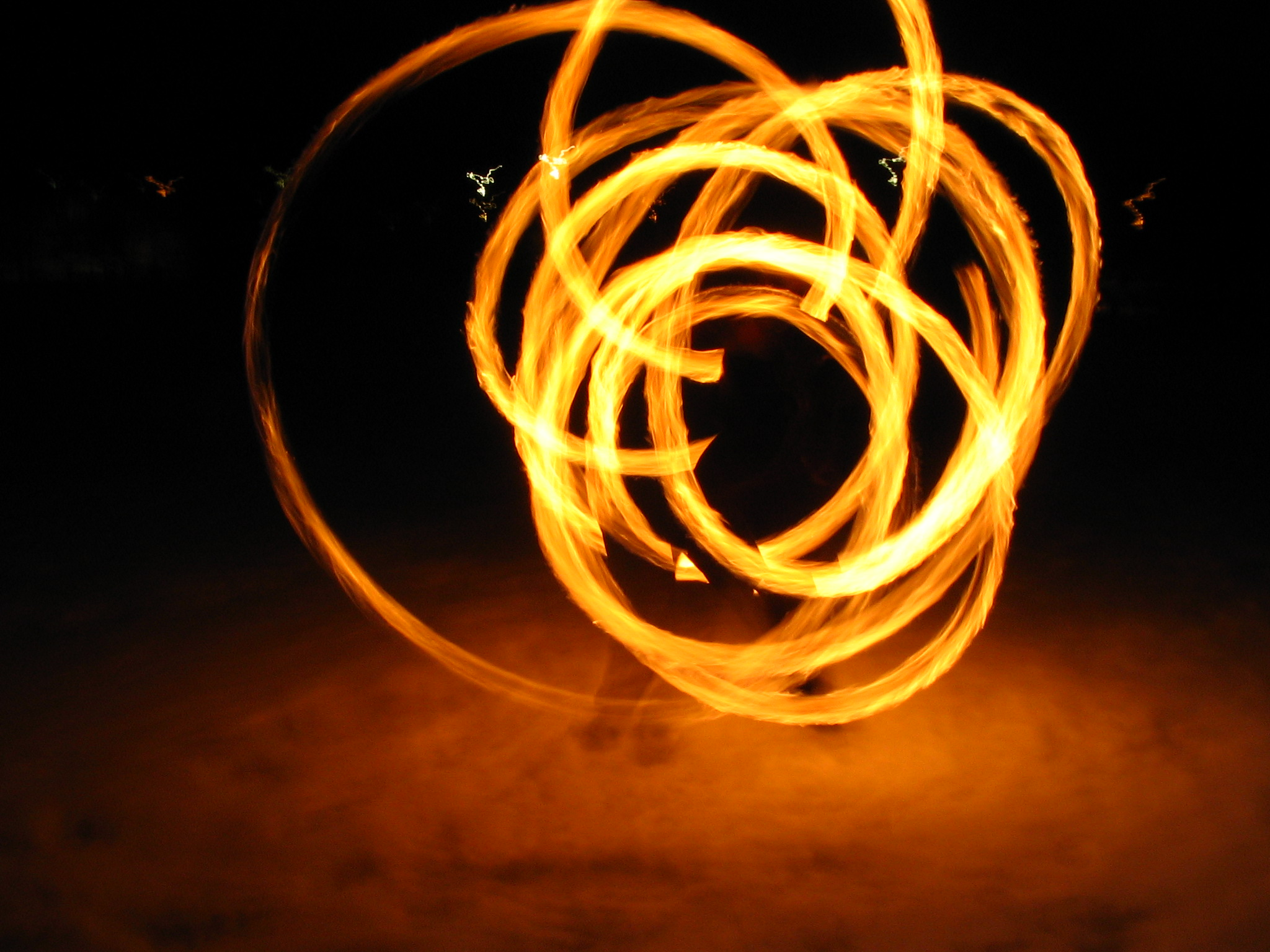 En bild på eldsv:poi i rörelse. Det är katedralpoi, och bilden är tagen vintern 2005 i snön i Stockholm